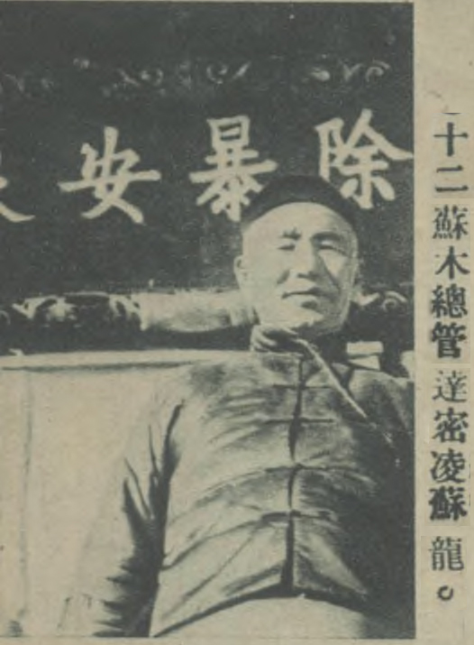 中文（台灣）: 民國二十六年二月東南日報新廈落成紀念特刊